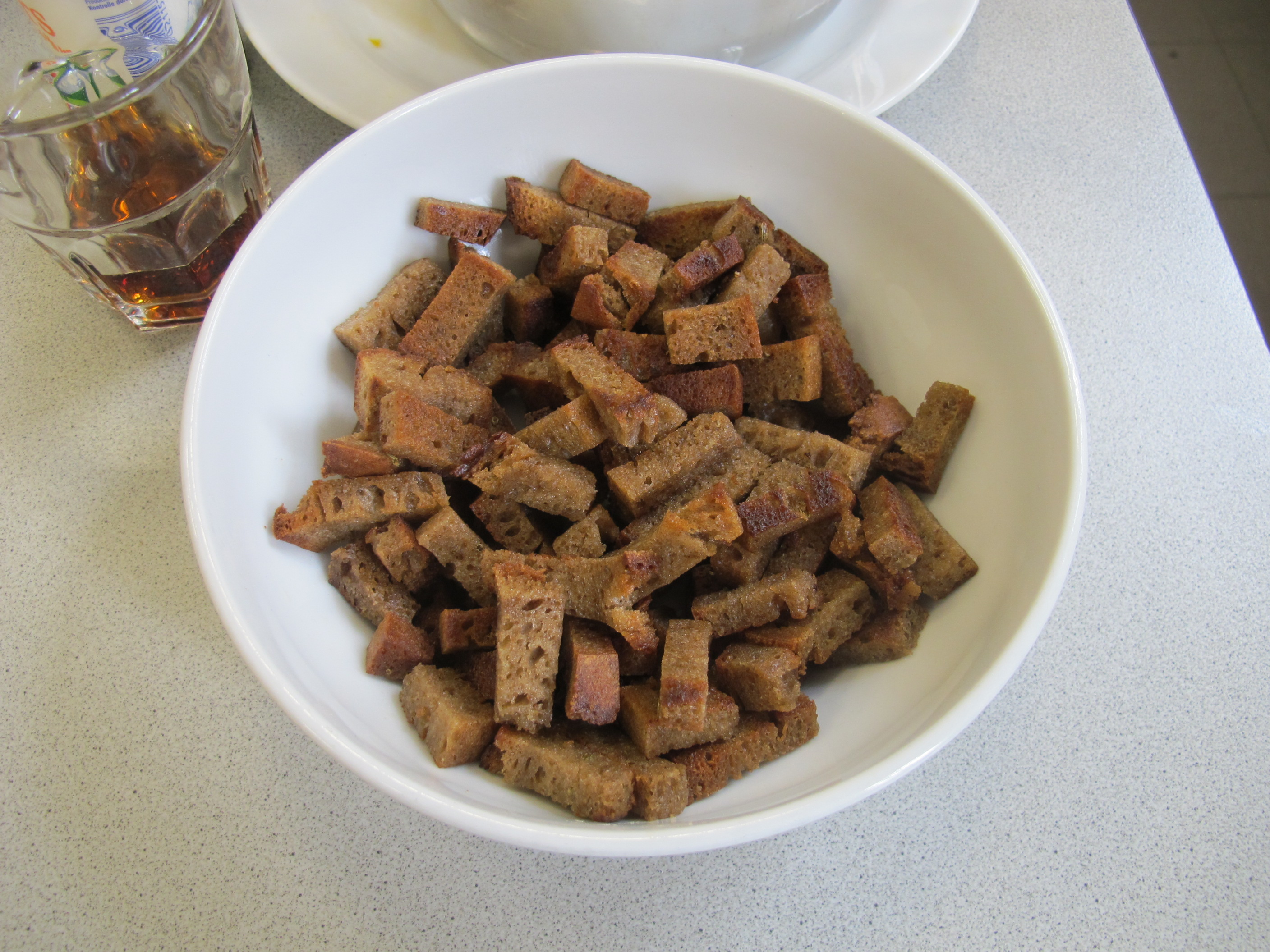 Portal Essen und Trinken der deutschsprachigen Wikipedia trifft sich in Wien zum Kochen Croutons aus Graubrot